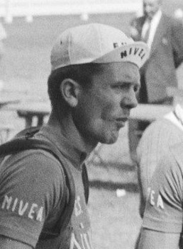 Start Ronde van Nederland Stadion Utrecht . Italiaanse ploeg (Nivea) kopman Fiorenzo Magni